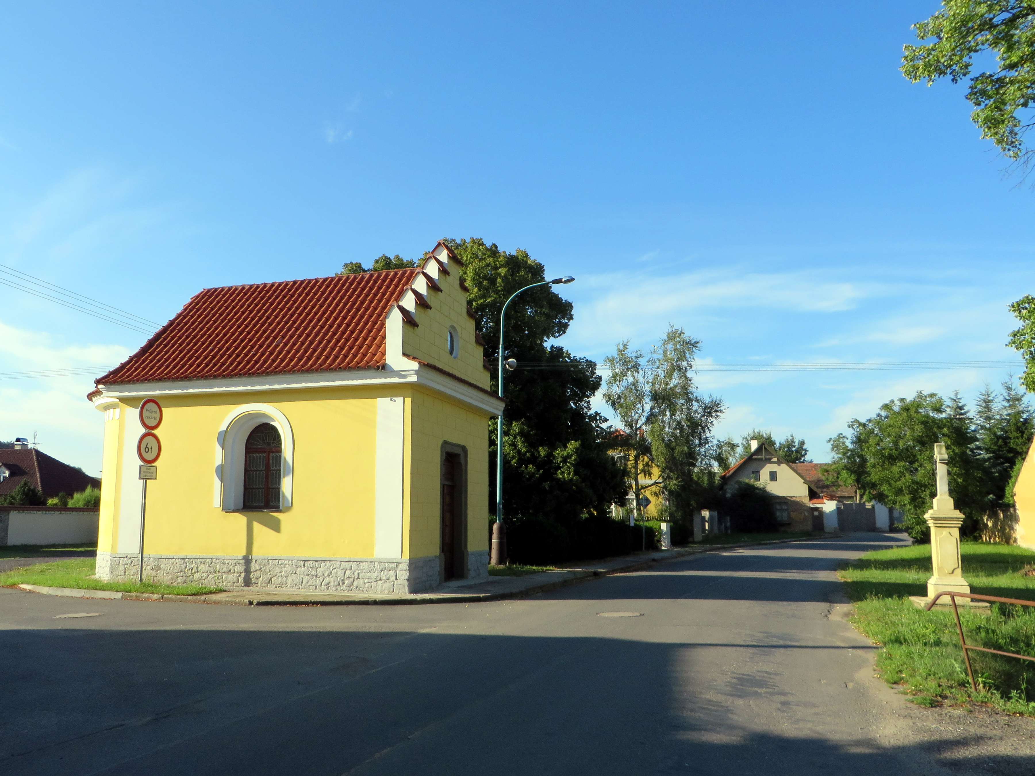 Kaple sv. Václava ve Starém Vestci.